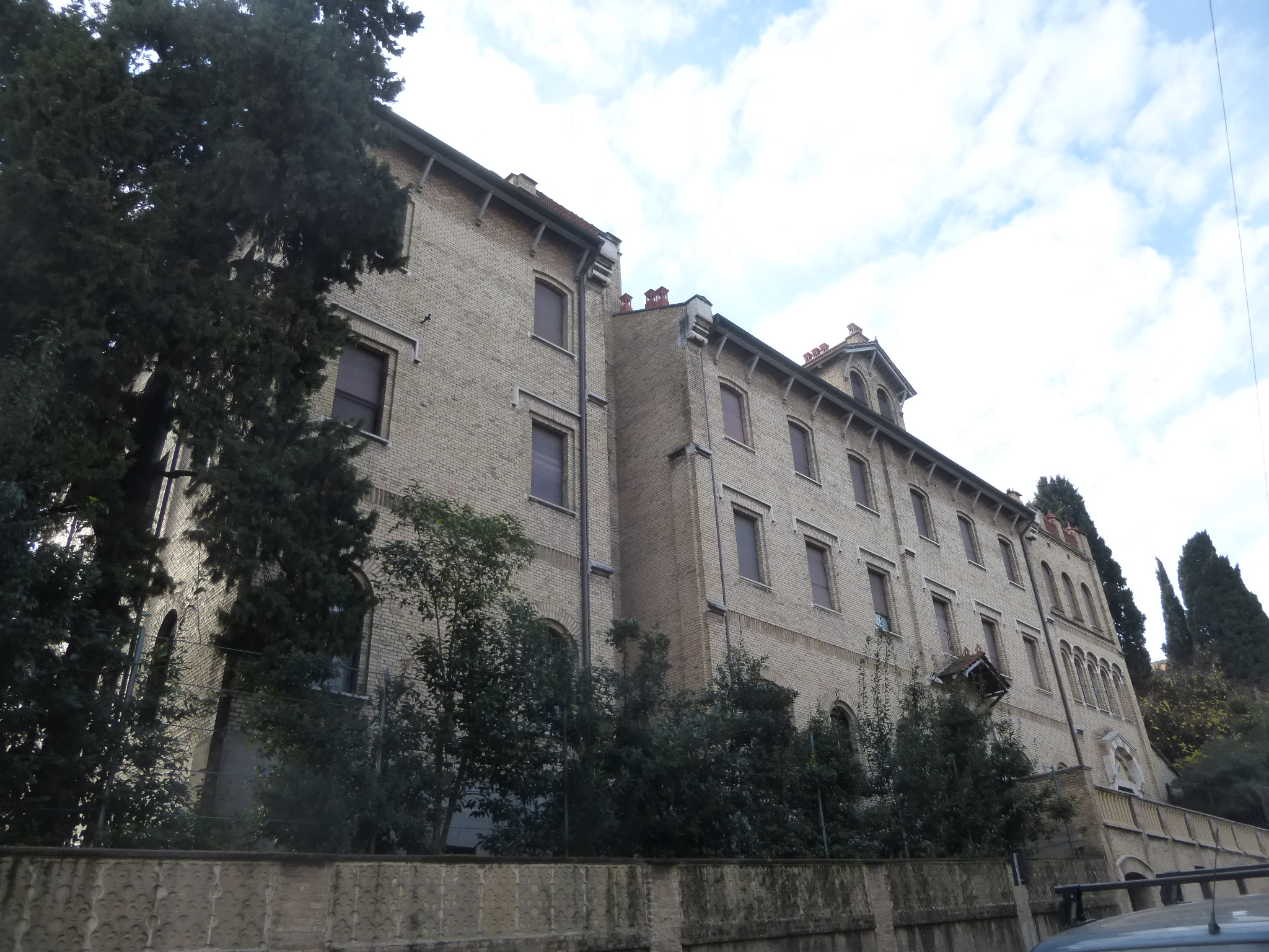 Roma, convento di Notre Dame des Oiseaux, facciata su via dei Villini